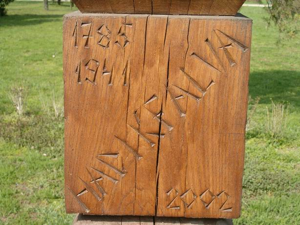 Detail from Kopjafa